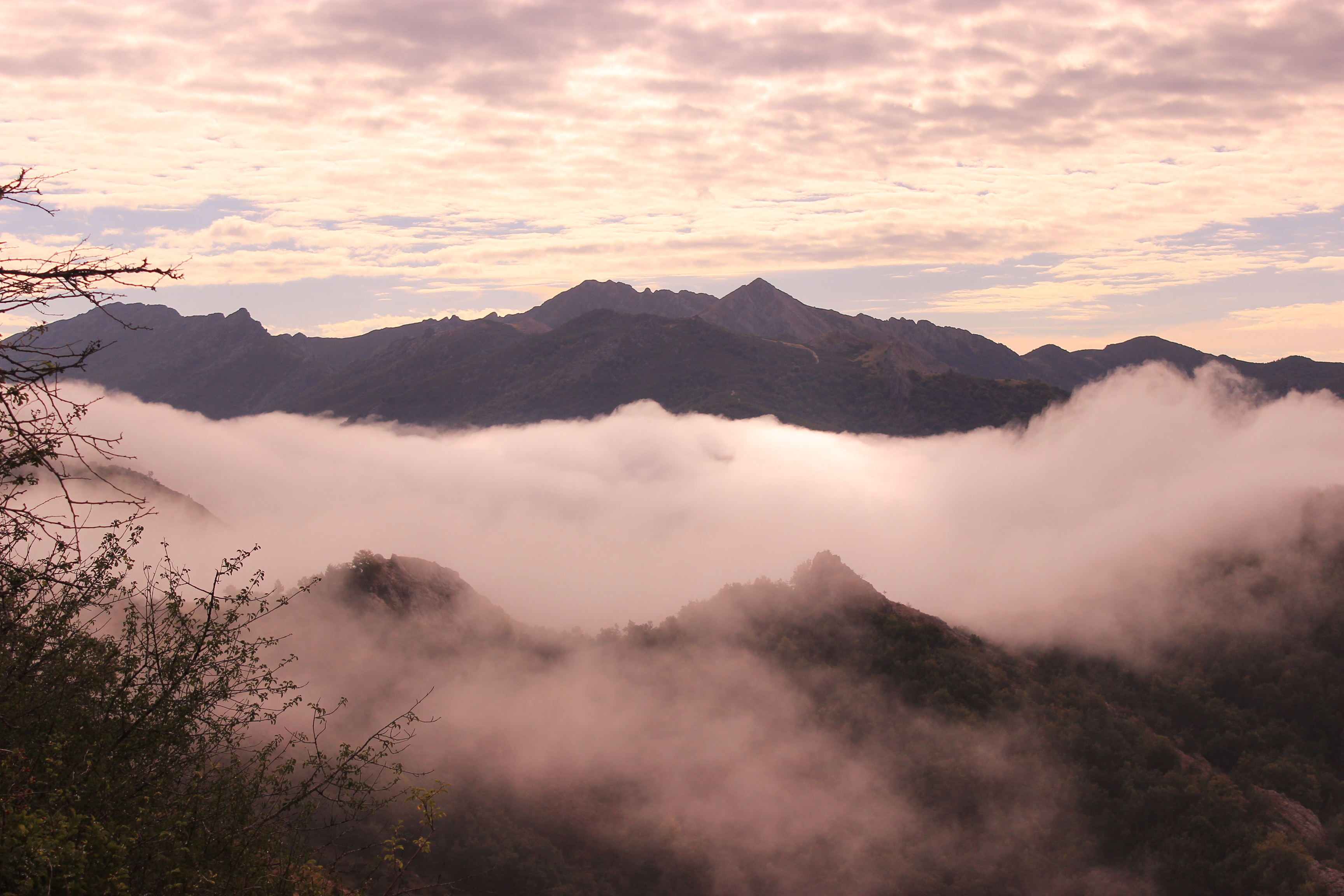 mar de nubes desde la traviesa de la Peña Las Pintas(Las Salas)